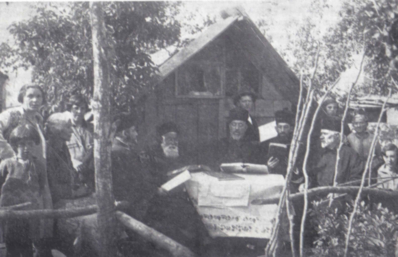 יהודי פלובדיב במחנות ארעיים לאחר רעידת האדמה ב-1928. במרכז התמונה הרב הראשי ליהודי העיר, שמואל בנימין בכר